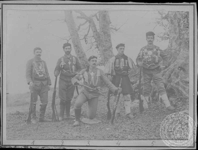 Гръцките андарти Теодорос Адам, Георги Курис и други